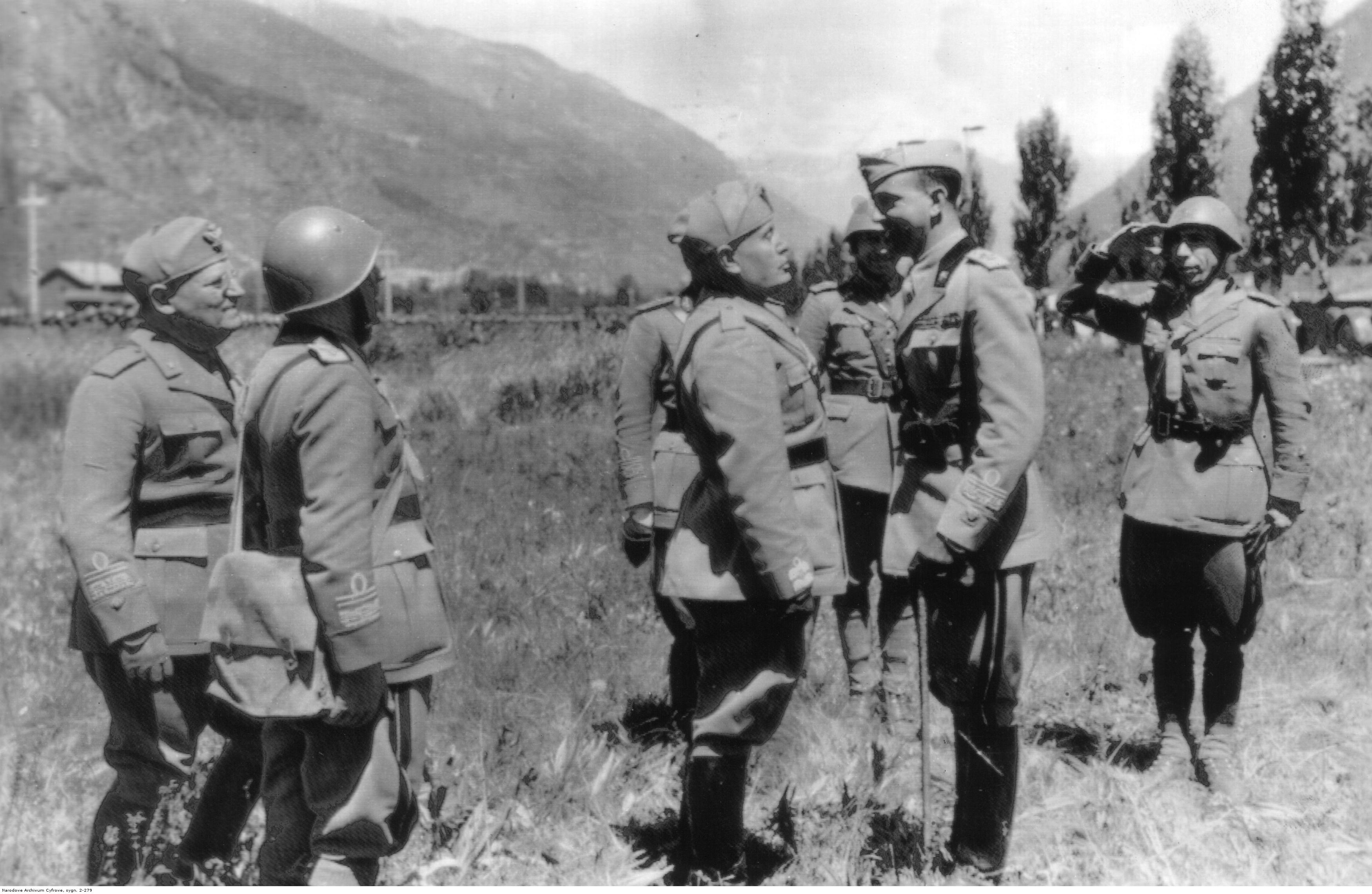 Benito Mussolini (w środku) w otoczeniu oficerów włoskich w rozmowie z następcą tronu ks. Umberto II (2 z prawej) podczas inspekcji w zdobytej miejscowości w Alpach francuskich.